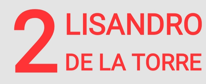 Línea 188 Ramal 2